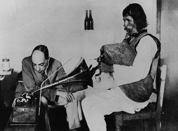 Etnograful Constantin Brăiloiu înregistreaza un cimpoier, 1934